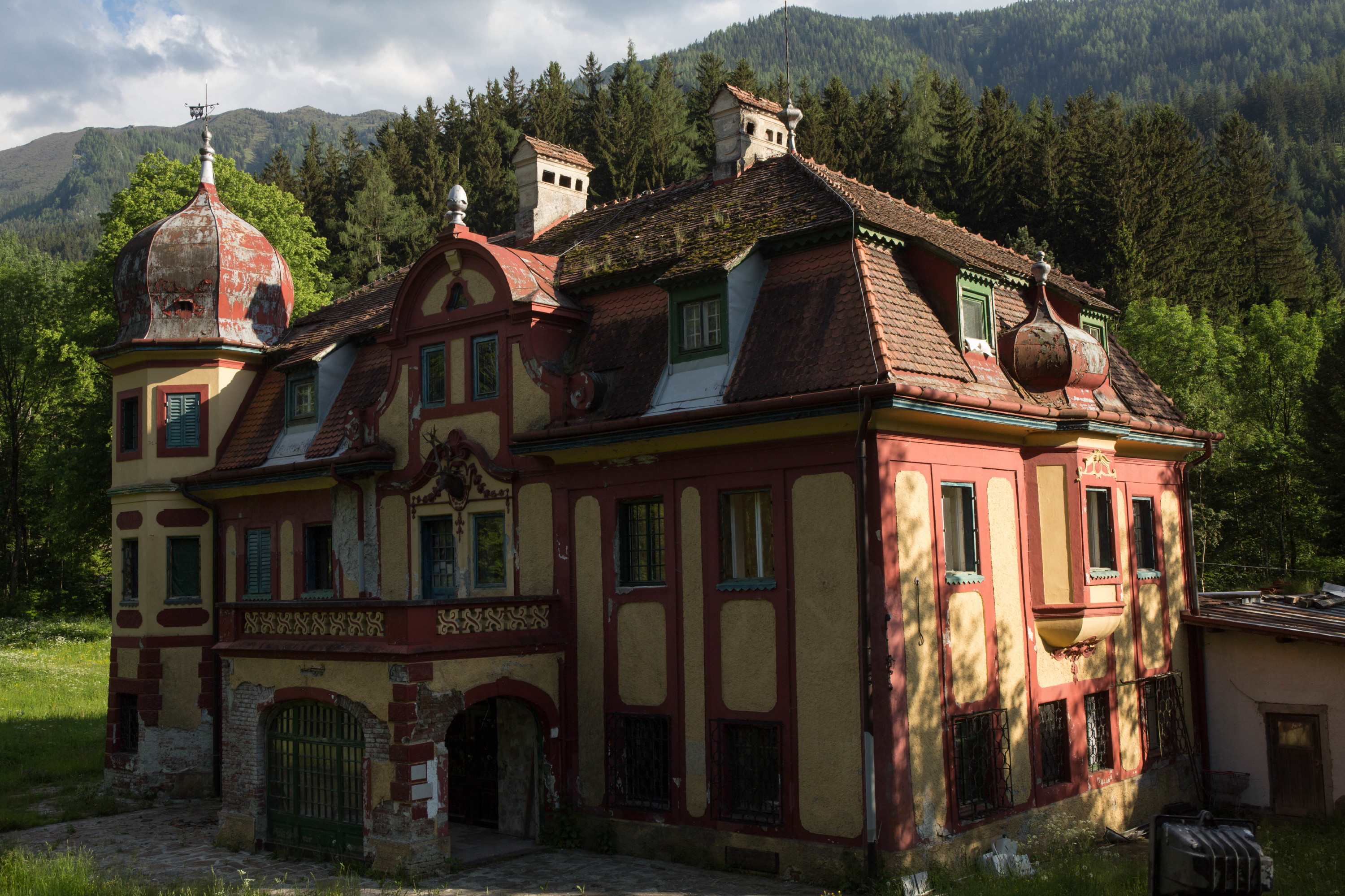 Sog. Schloss Paltenstein, ehem. Hammerherrenhaus